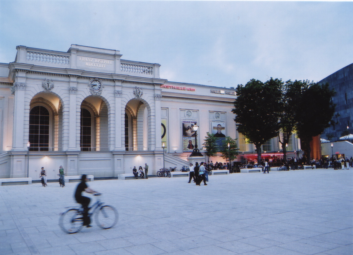 Hausansicht